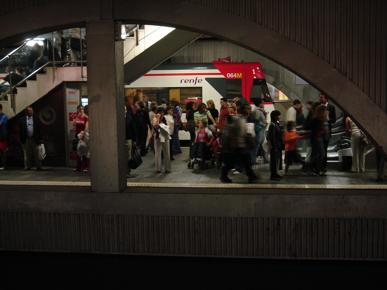 Estació de Renfe Operadora vista des de l'estació de Metro de la L1.